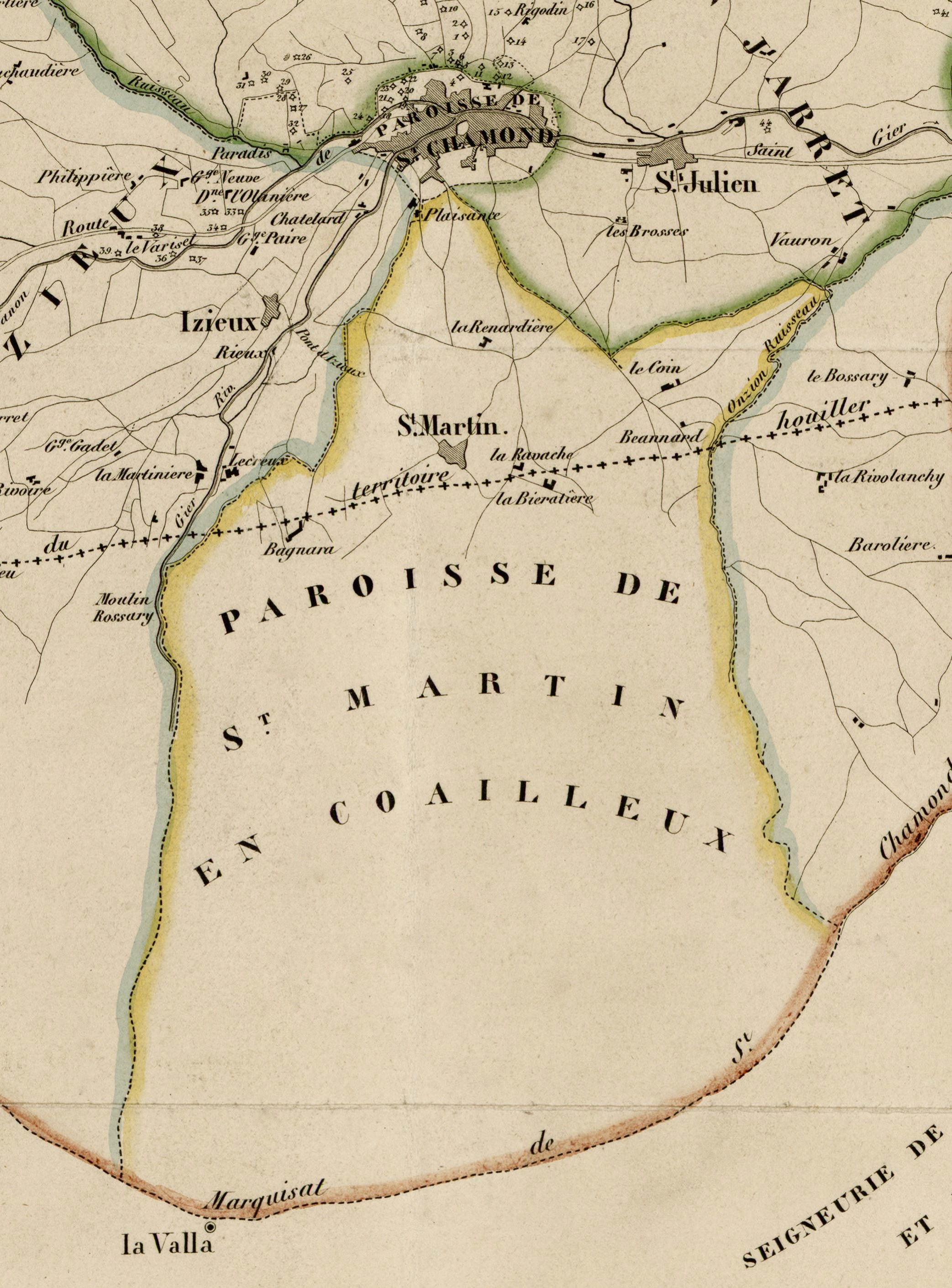 Saint-Martin-en-Coailleux (Loire), extrait de la carte de Saint-Chamond et environs au point de vue des concessions houillères,1850 (domaine public).